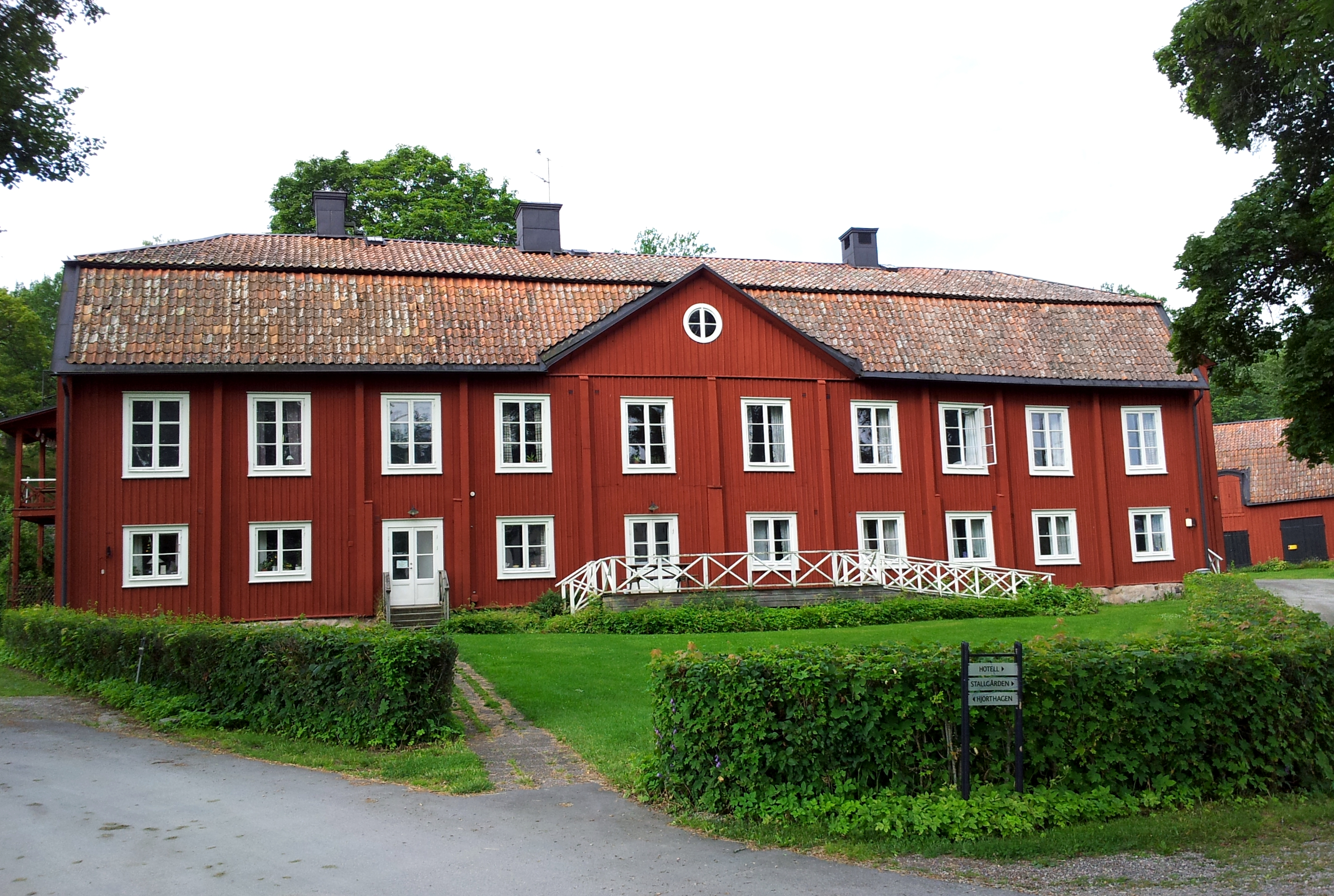 Stallgården, f d arbetarbostad vid Gripsholms kronobränneri, Mariefred